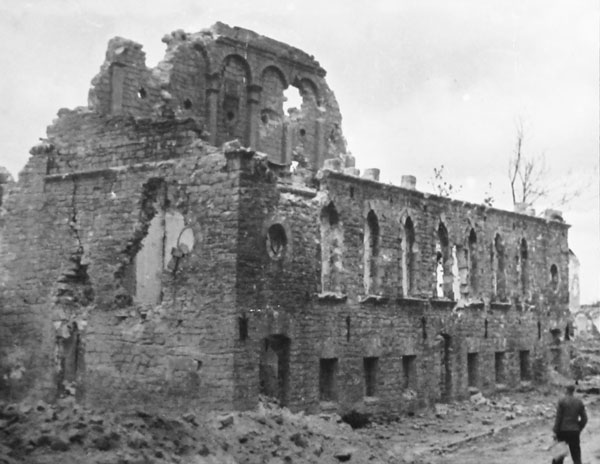 Стара синагога в Тернополі (післявоєнний період): Залишки будівлі єврейського храму. Нині на його місці - художня майстерня